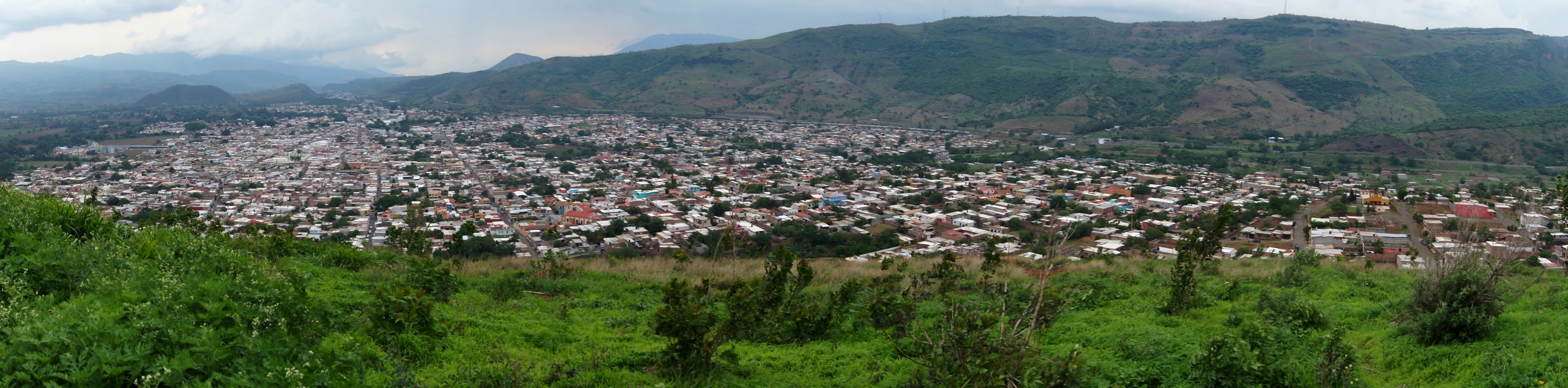 Beautiful View